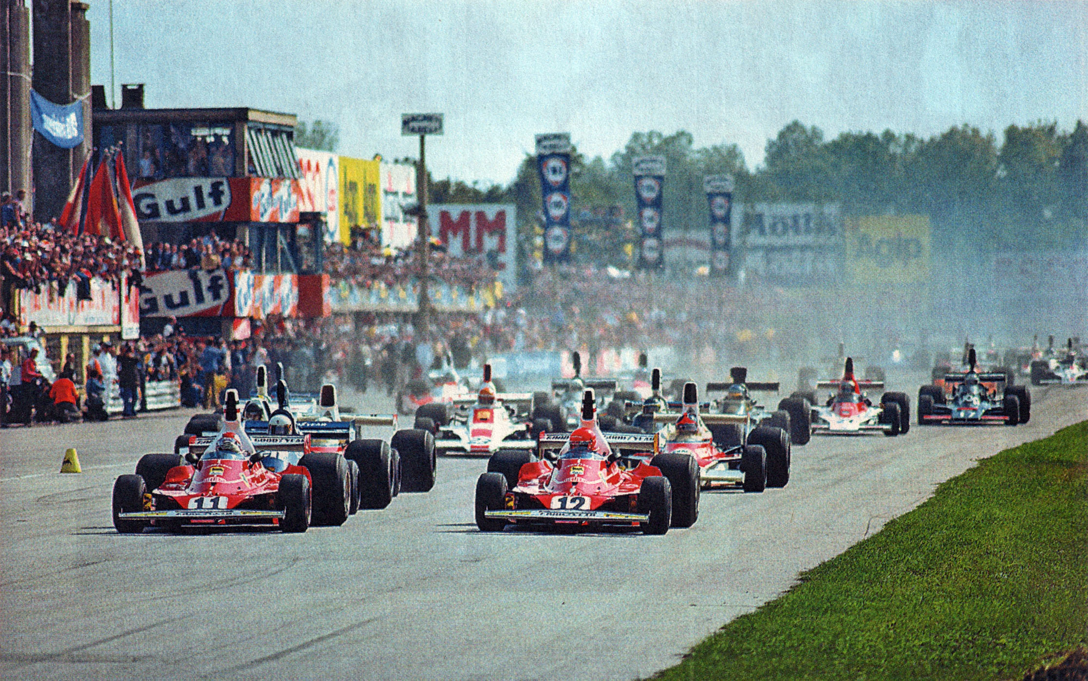 Monza, Autodromo Nazionale, 7 settembre 1975. I due piloti della Scuderia Ferrari, lo svizzero Clay Regazzoni (n. 11) e l'austriaco Niki Lauda (n. 12), questo ultimo poleman, scattano in testa alla partenza del XLVI Gran Premio d'Italia a bordo delle loro Ferrari 312T.